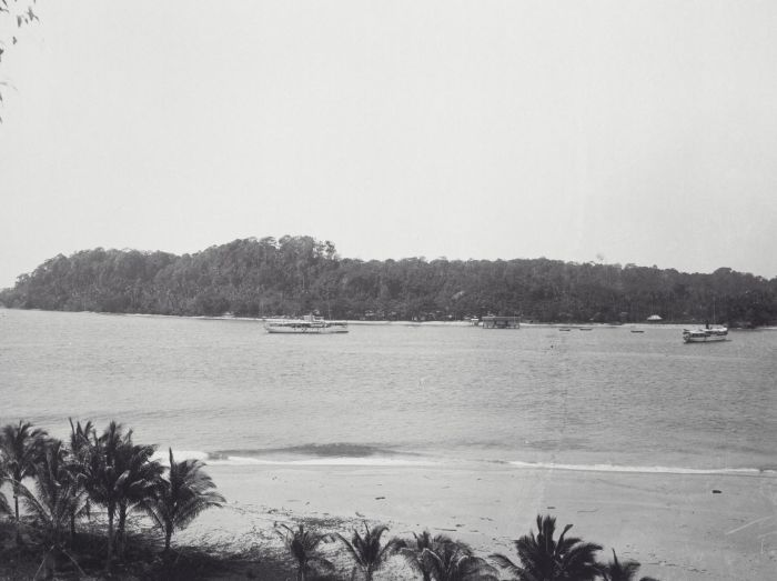 foto. Gezicht op Poeloraja